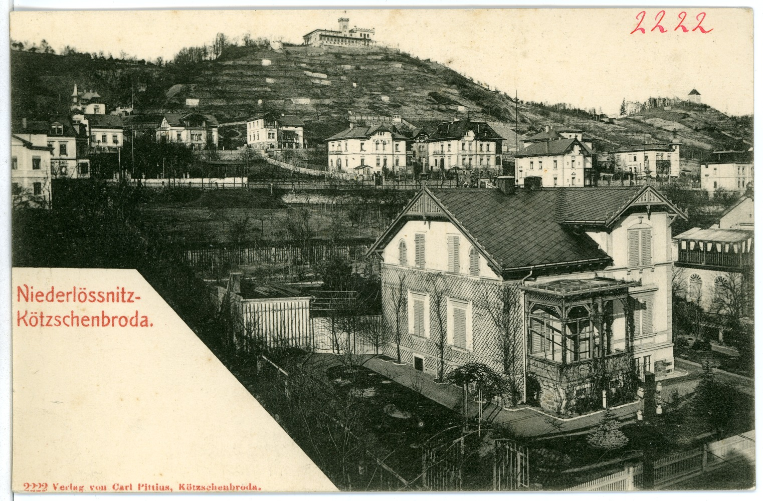 Kötzschenbroda; mit Niederlößnitz This postcard is from publisher Brück & Sohn in Meißen ( postcard has a unique number 02222 and is available in a higher resolution at the publisher. This images was uploaded in a cooperation project between Wikipedians and the publisher.